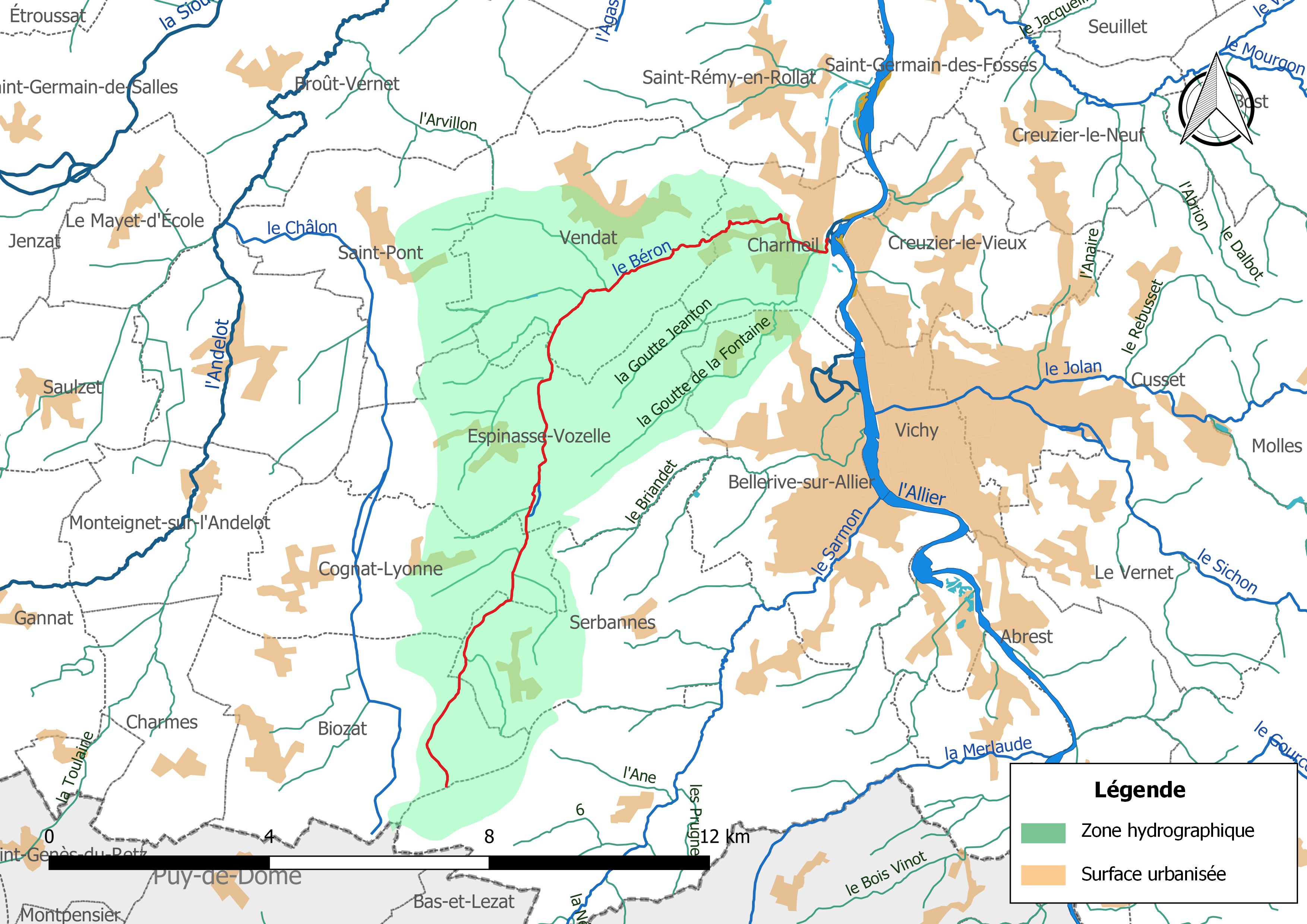 Carte du cours d'eau « le Béron » (France) et de la zone hydrographique dans laquelle il s'insère.